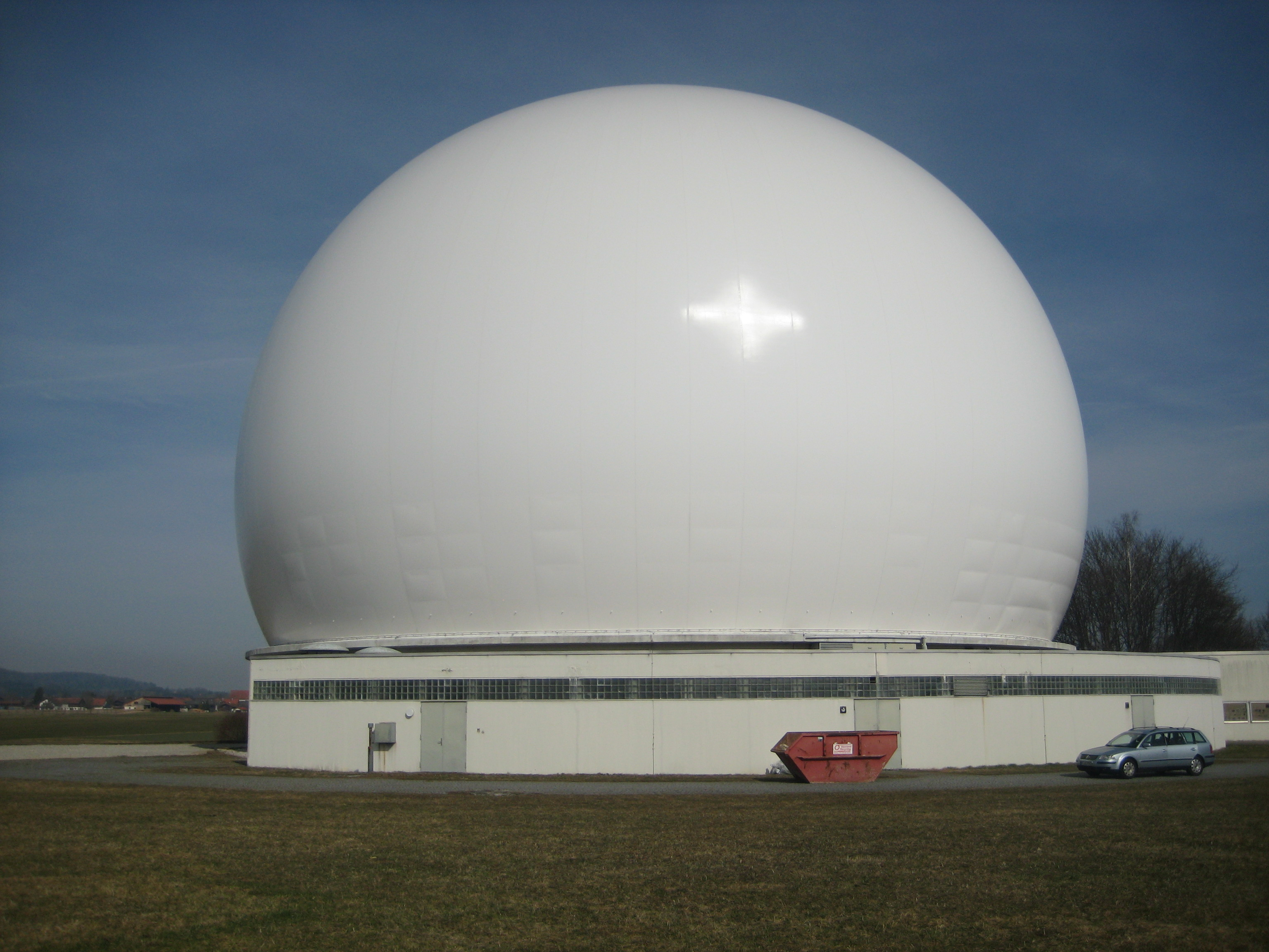 Rundbau mit neuer, strebenloser, kugelförmiger Kuppel aus Kunststoff (Radom)